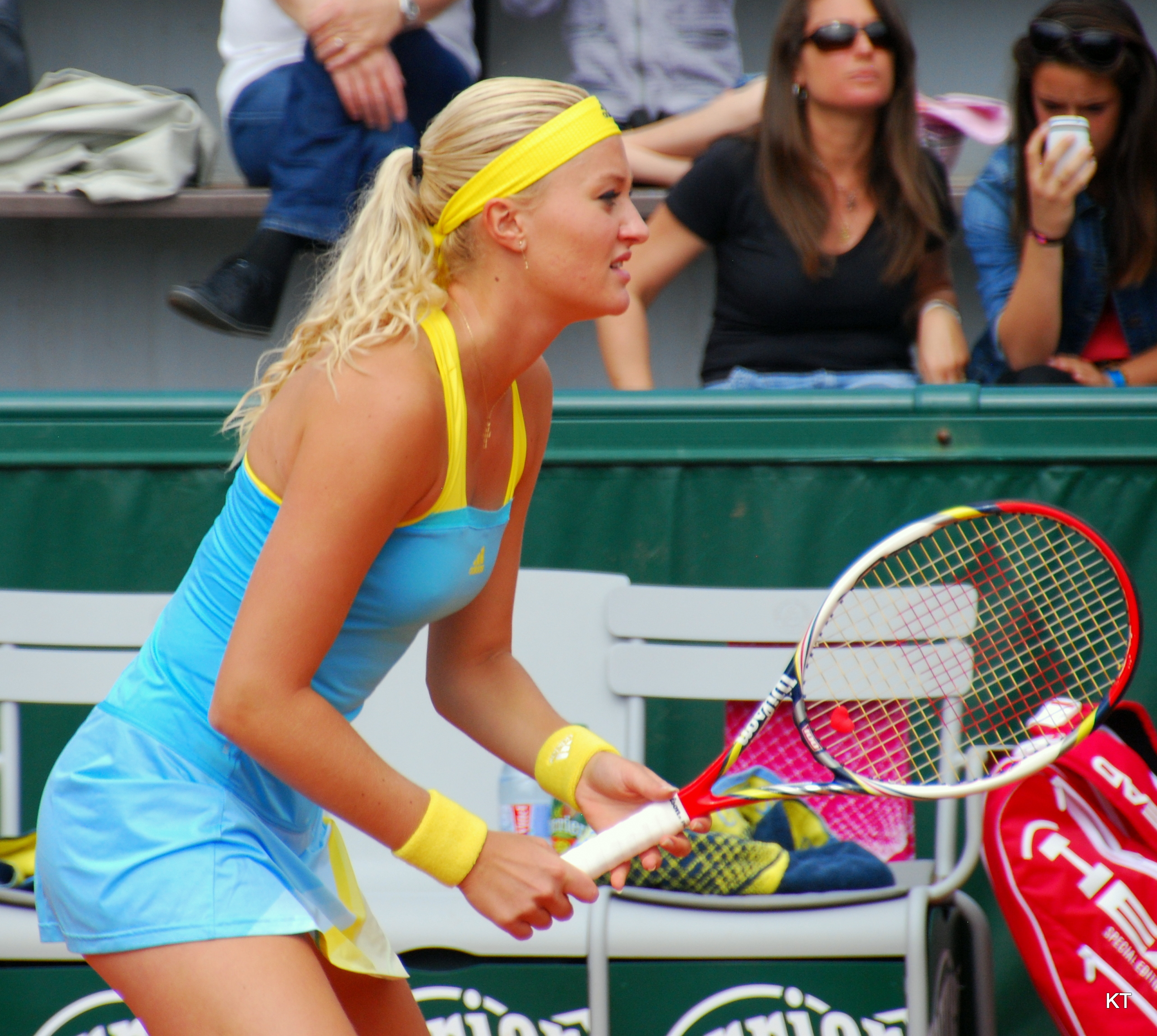 Kristina Mladenovic